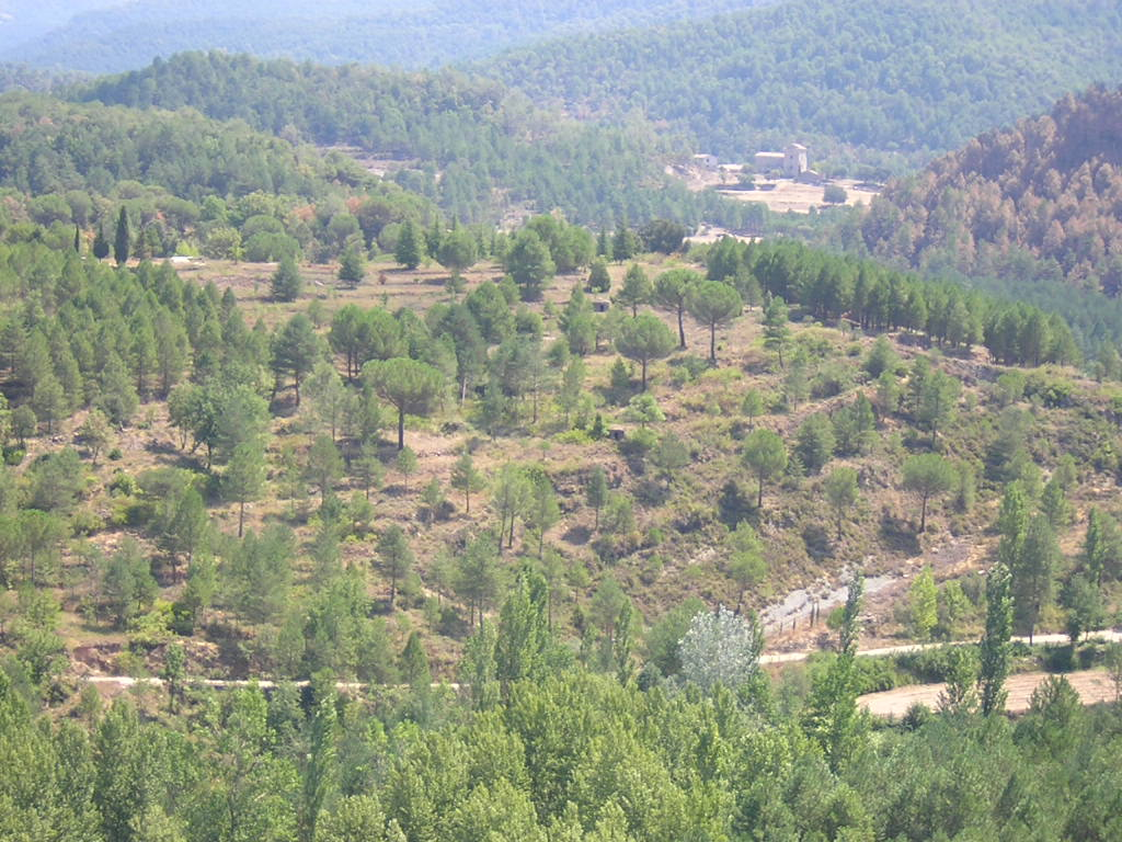 La Daina (Monistrol de Calders, Moianès)